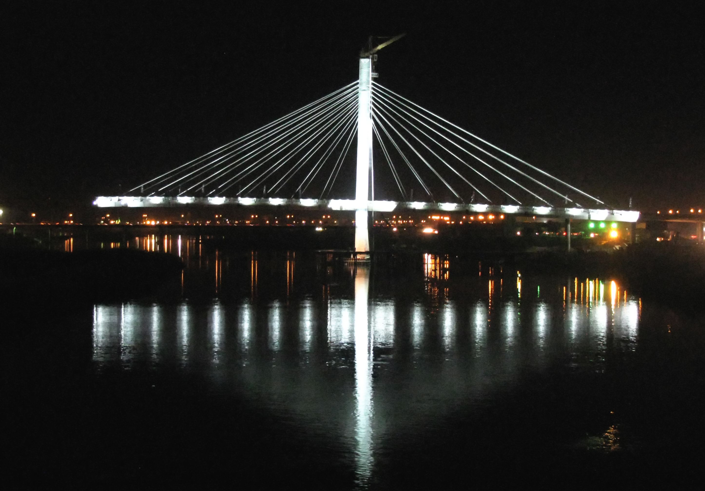 پل هشتم (کابلی) اهواز